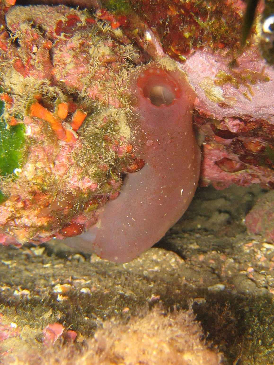 Ascidie rose (Ascidia mentula) en Méditerranée près de Banyuls